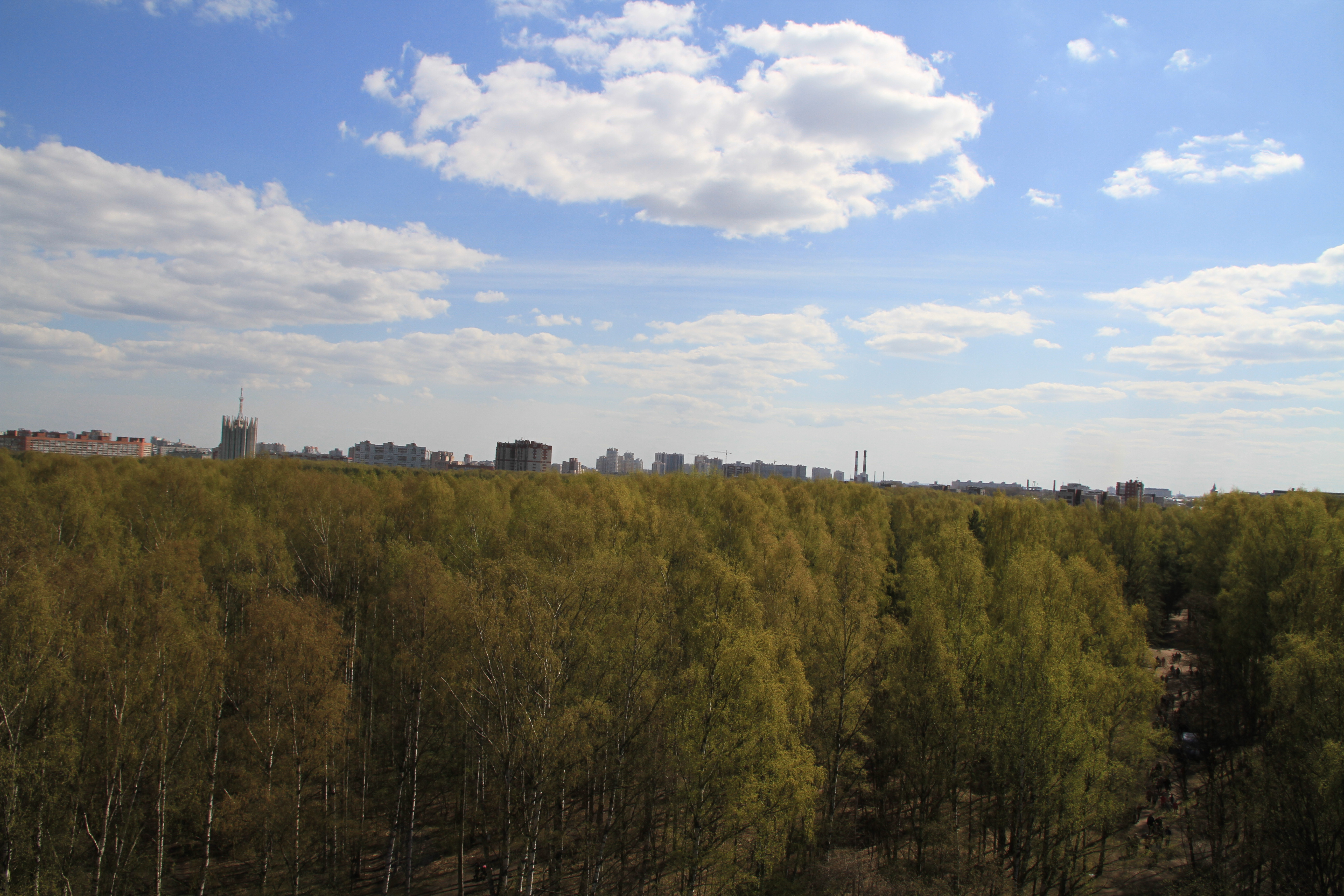 Парк Сосновка